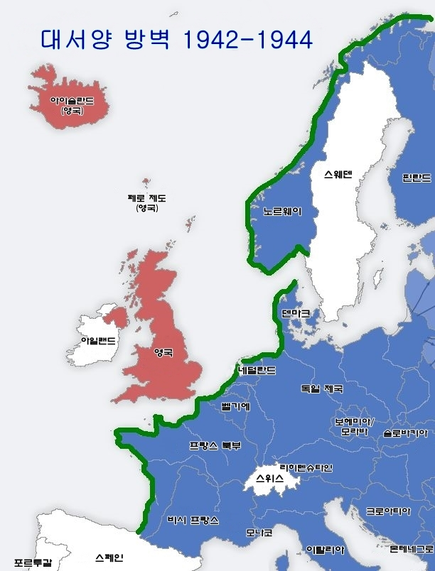 초록줄:대서양 방벽, 붉은지역:연합국, 푸른지역:독일 제3제국과 추축국, 흰지역:중립국